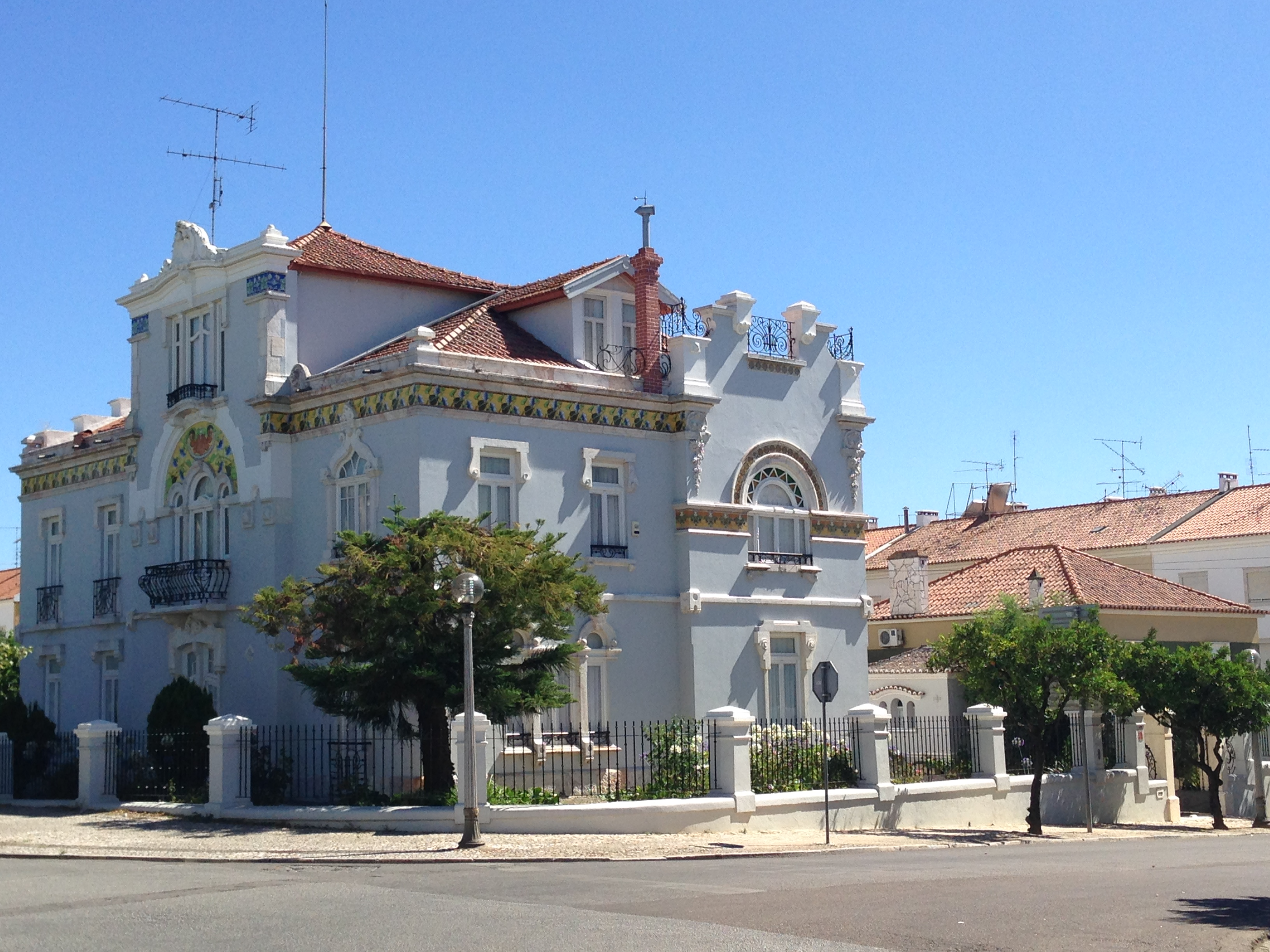 Palacete Vieira da Silva - Fachada geral